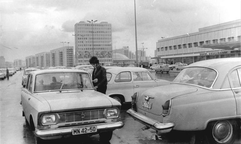 Zentralbild-Deutsche Demokratische Republik 13.11.1970 schw Sowjetische Personenkraftwagen auf den Straßen der DDR Unzählige PKW aus der befreundeten Sowjetunion befahren täglich die Straßen der Deutschen Demokratischen Republik. Unser Foto zeigt einen PKW vom Typ "Moskwitsch" (links) und einen parkenden "Wolga" auf dem Berliner Alexanderplatz. Im Hintergrund das Haus des Lehrers und rechts das kürzlich eröffnete Interhotel "Stadt Berlin". Reporter: Sturm Copyright: ADN-Zentralbild"